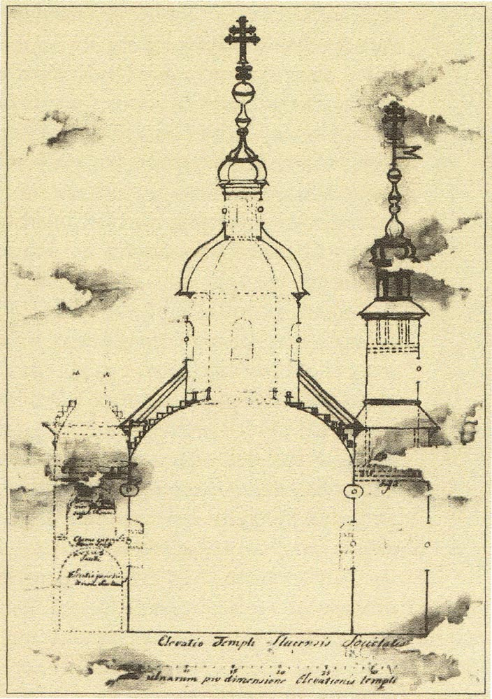 Беларуская (тарашкевіца): Слуцак (Słucak), Новае Места (Novaje Miesta), вуліца Сэнатарская (vulica Senatarskaja). Касьцёл Найсьвяцейшай Тройцы ордэна езуітаў